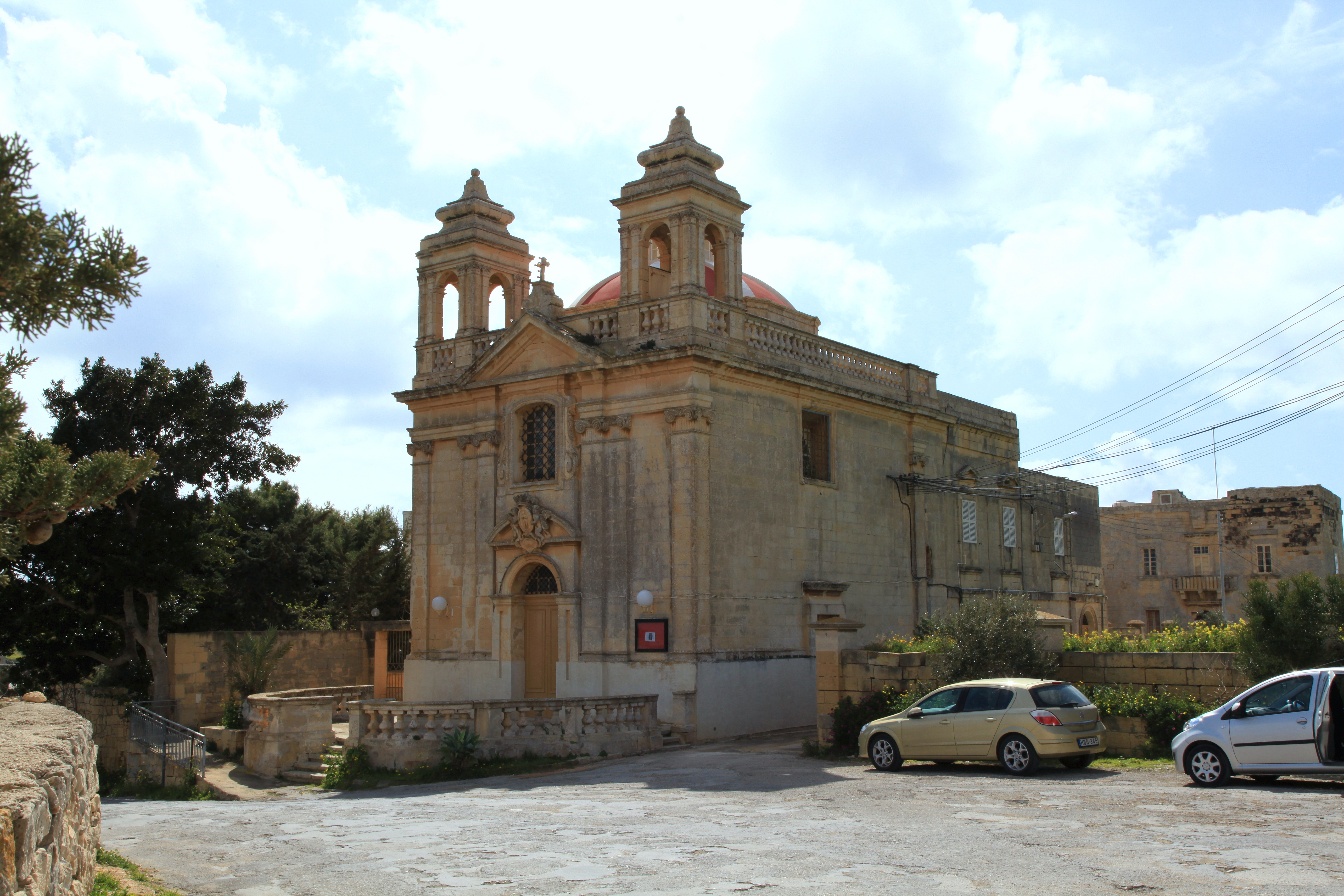 Il-Kappella tal-Madonna tas-Silġ, Triq Delimara in Marsaxlokk, Malta